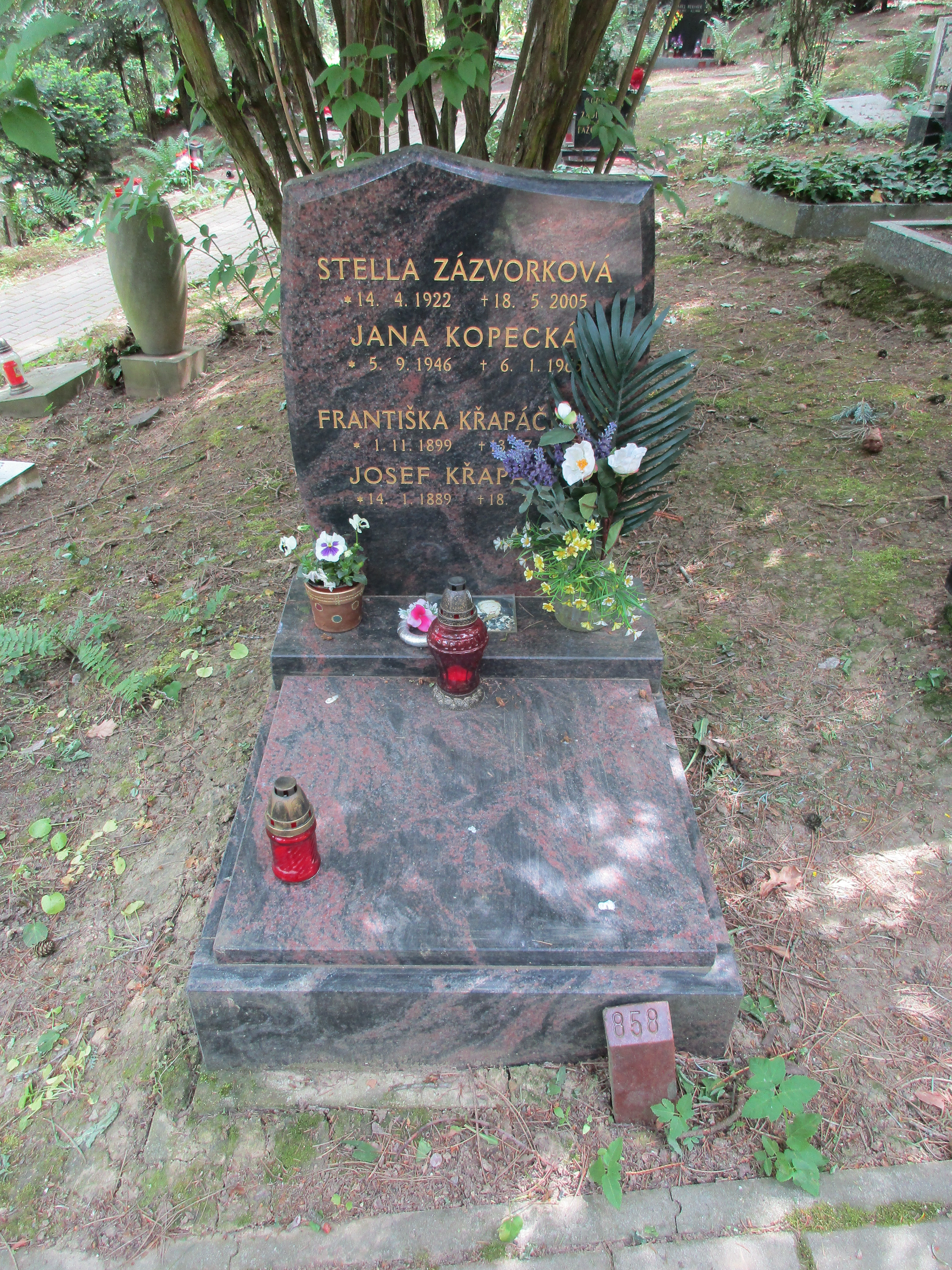 Hřbitov Motol - hrob herečky Stelly Zázvorkové.